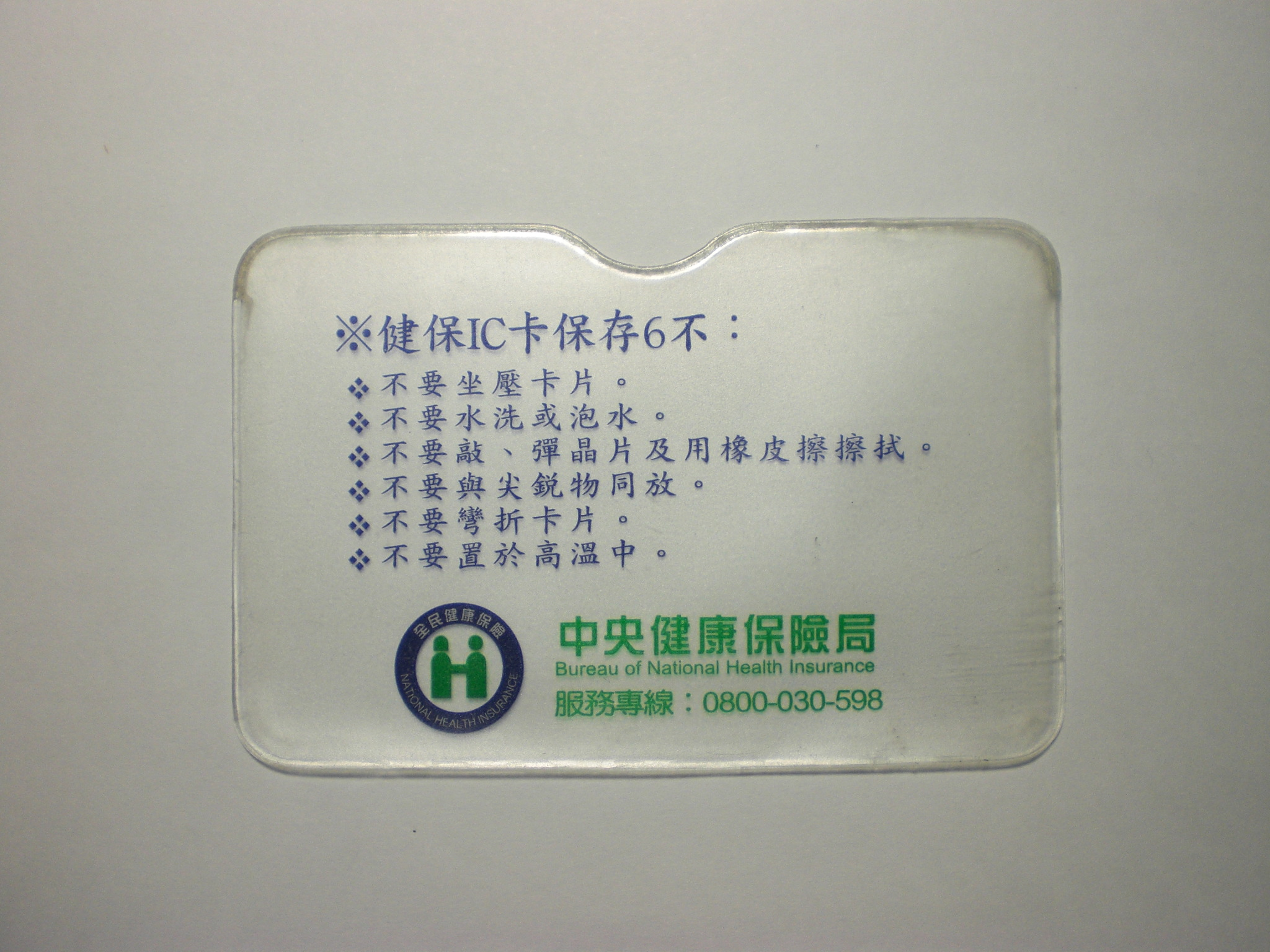 中華民國行政院衛生署中央健康保險局的全民健康保險IC卡透明保護套，標示「健保IC卡保存6不」與全民健康保險標誌。